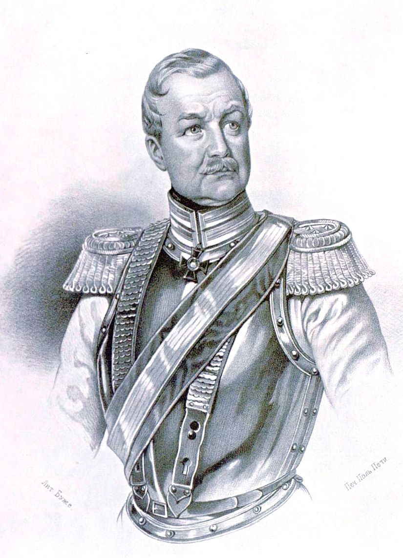 Родион Егорович Гринвальд, командир Кавалергардского полка с 25 июня 1833 по 4 мая 1839